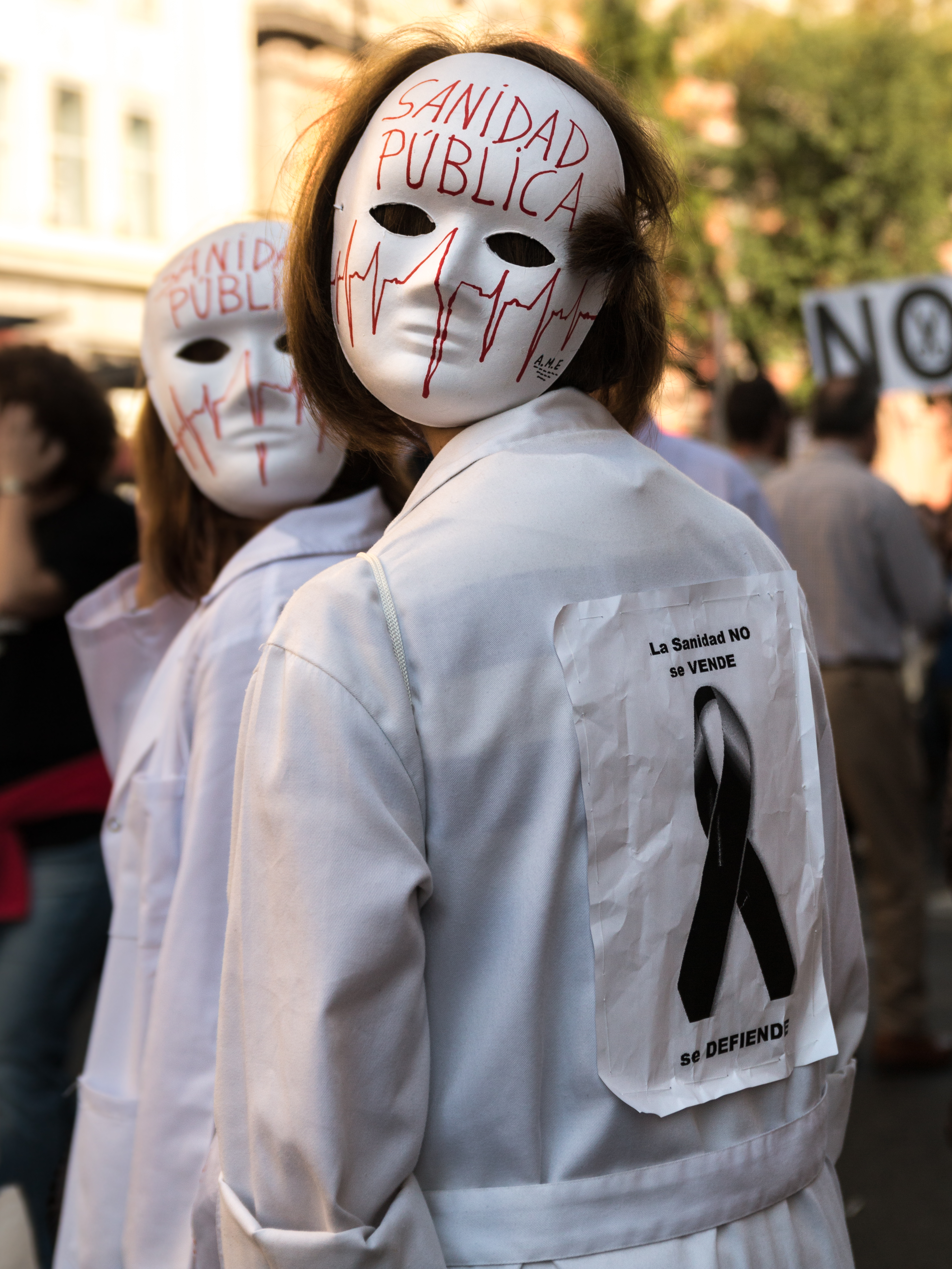 Manifestación de la "Marea Blanca" contra la privatización de la sanidad pública, Madrid.